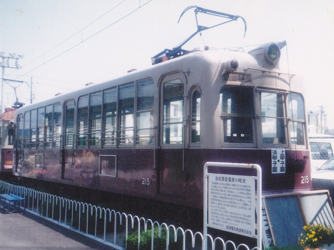 阪神パークで保存されていた215号車（1990年5月27日撮影）